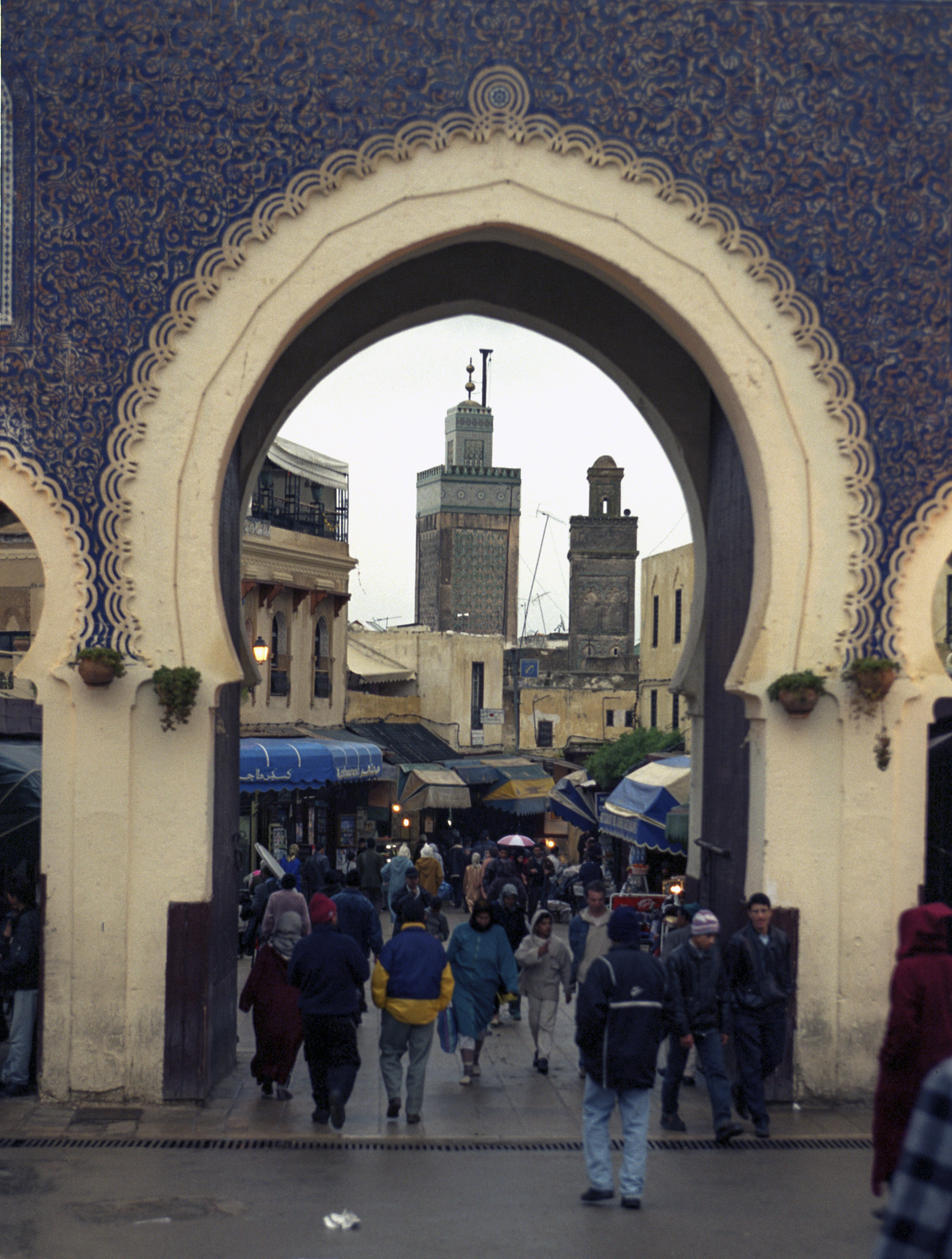 Fez. Brama Bab Bu Dżelud